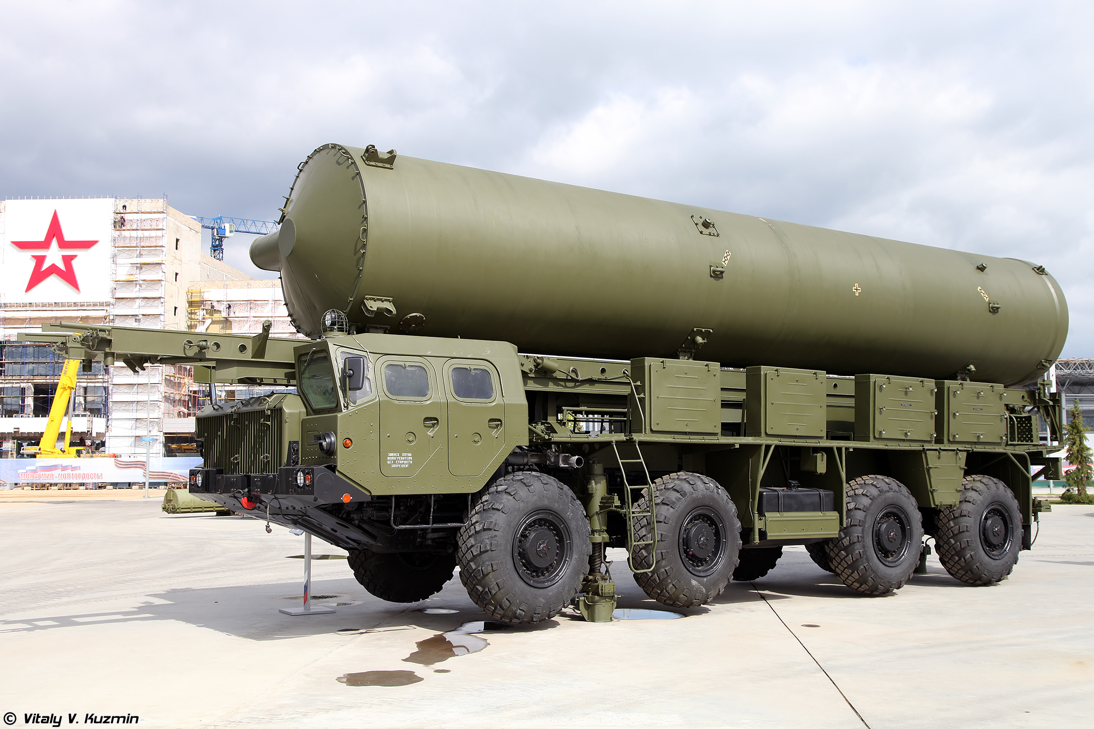 Транспортно-заряжающая машина 5Т92 (Transporter-loader 5T92)